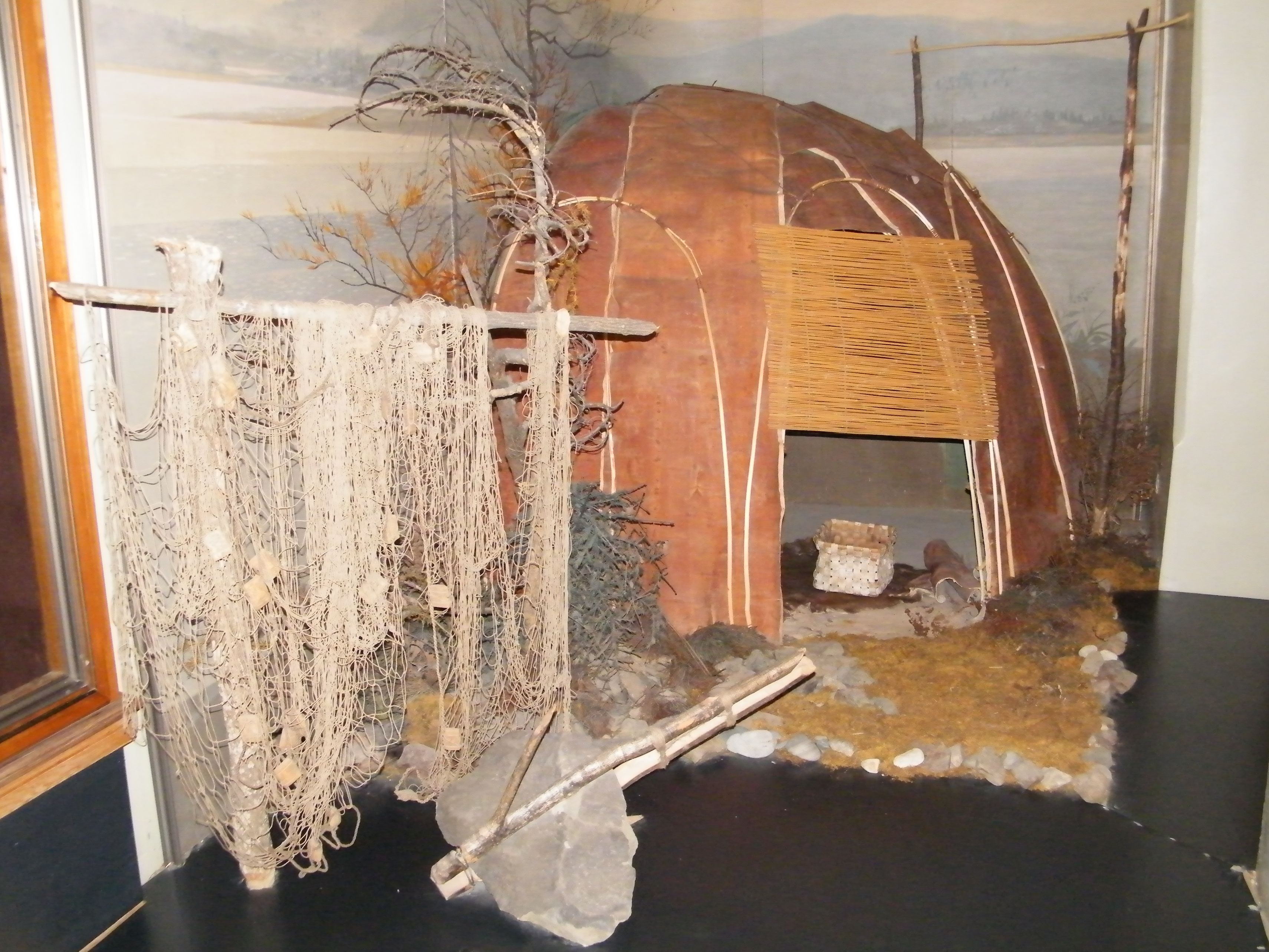 Летнее нанайское жилище из бересты и ивовых прутьев. На заднем плане - вешала для юколы, спереди - деревянный якорь.